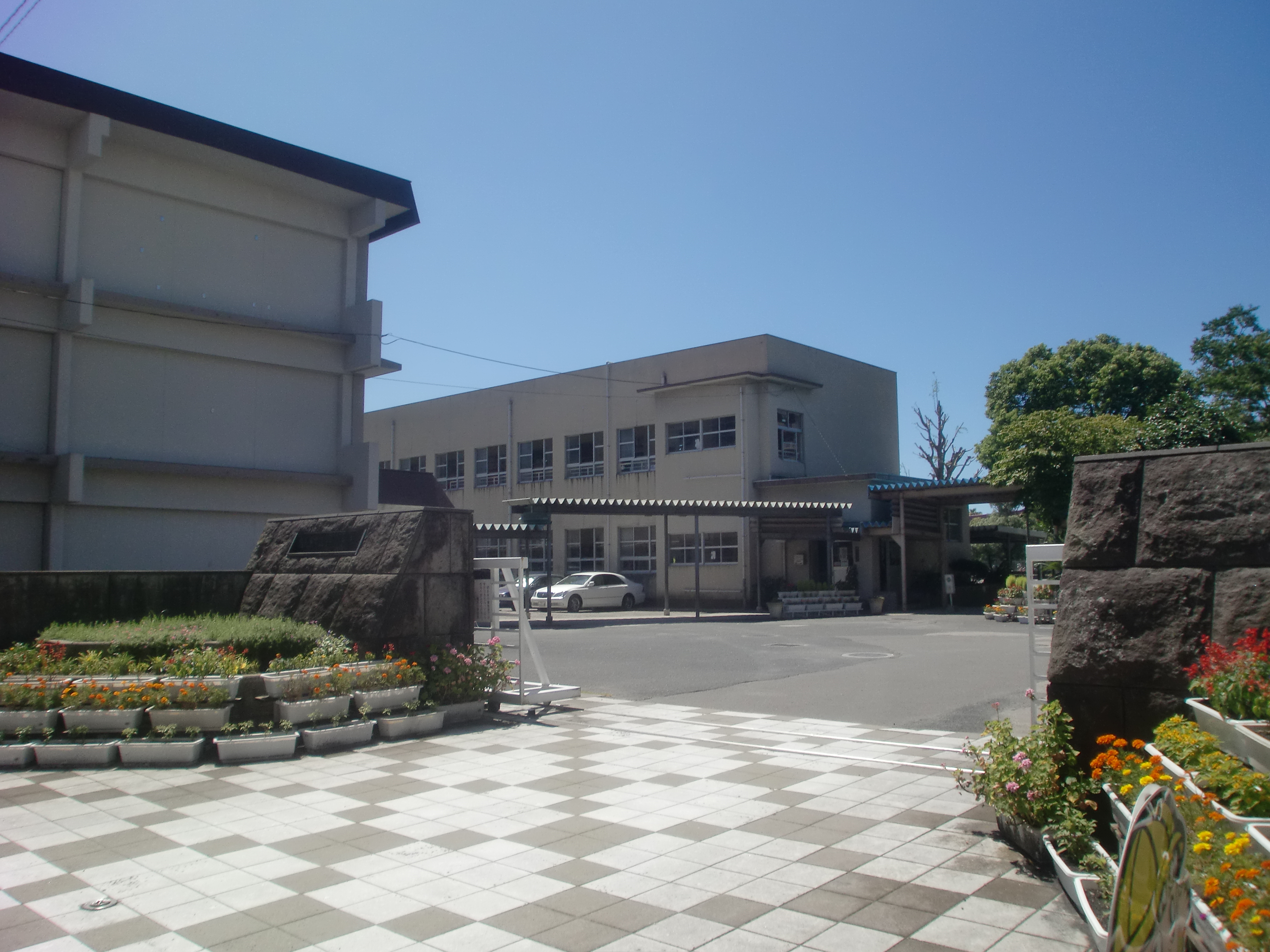 鹿児島市立鴨池小学校の外観。